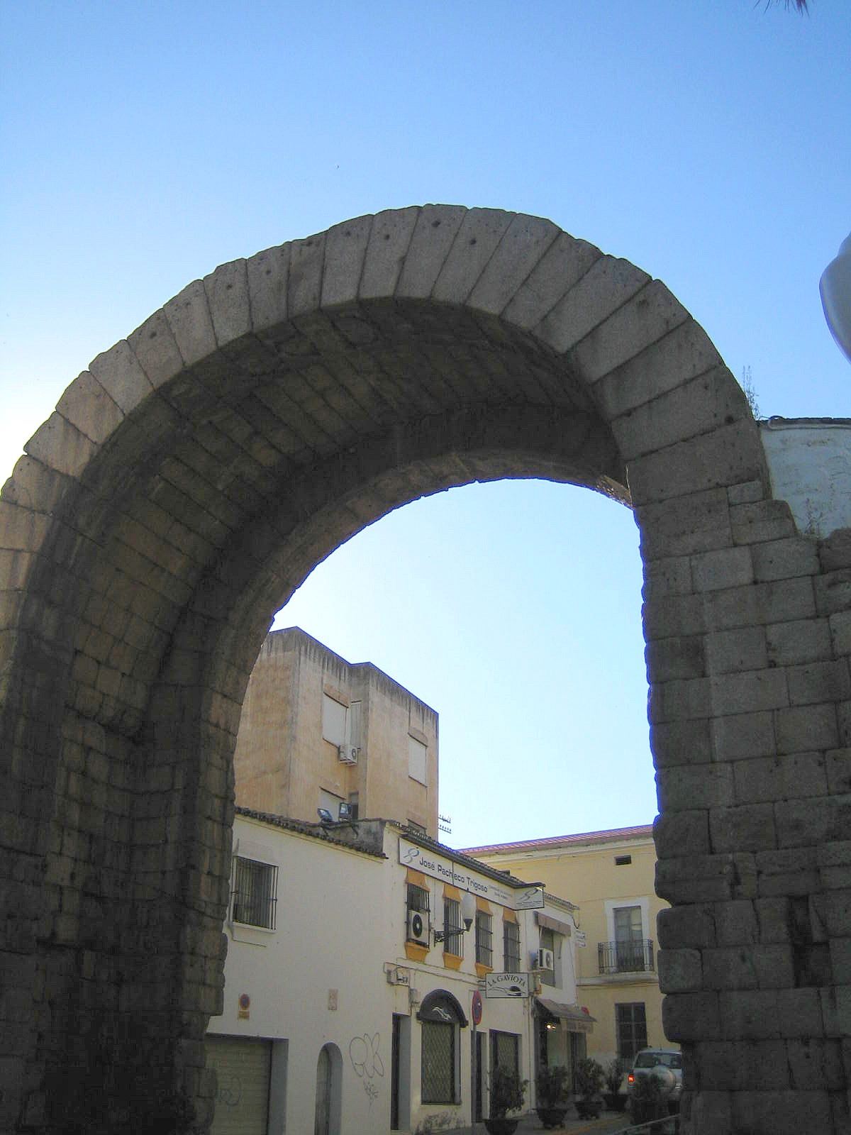 El Arco de Trajano de Merida